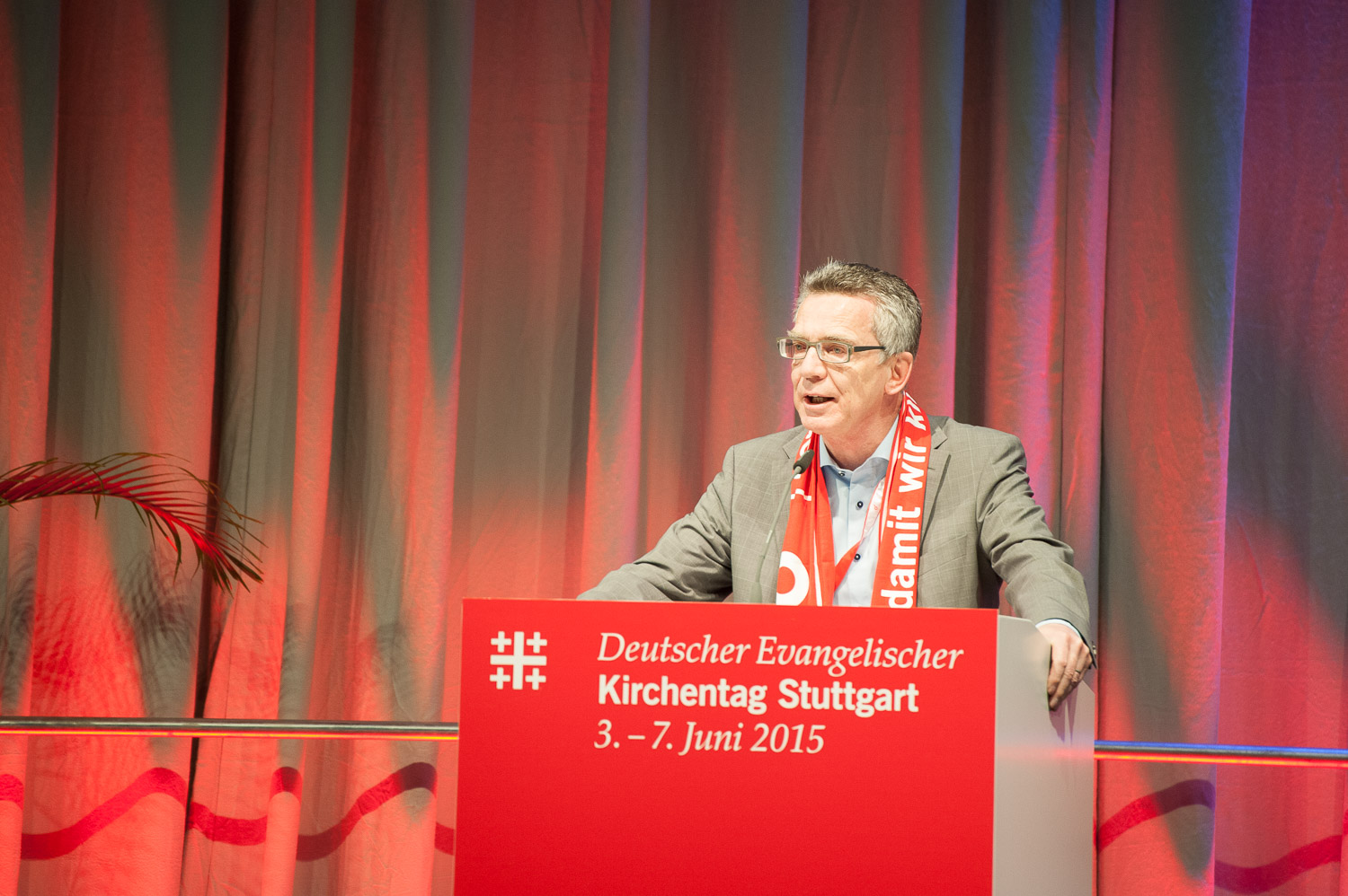 Innenminister Thomas de Maiziere während einer Bibelarbeit auf dem Deutschen Evangelischen Kirchentag 2015 in Stuttgart